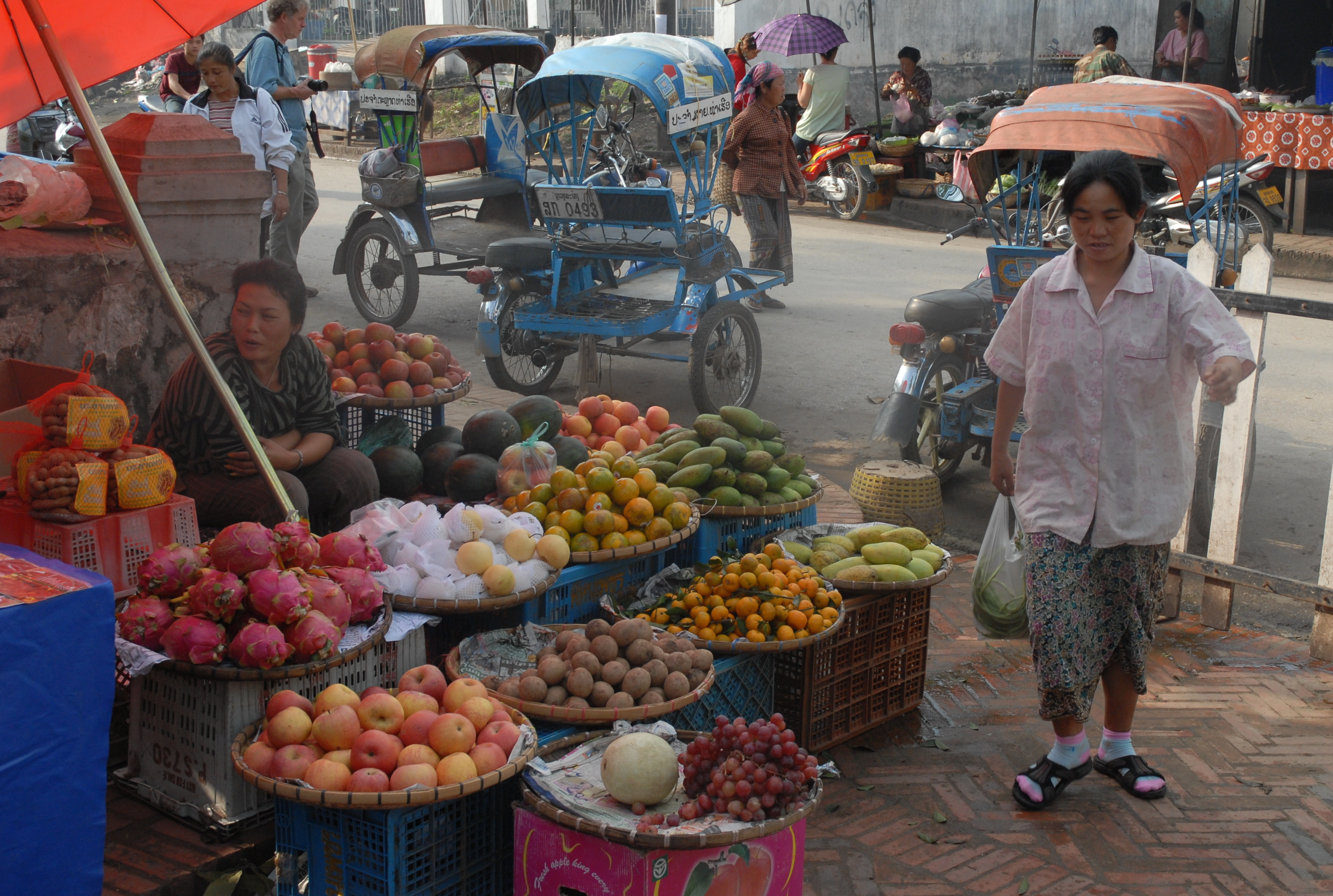 Luang Prabang : marché matinal